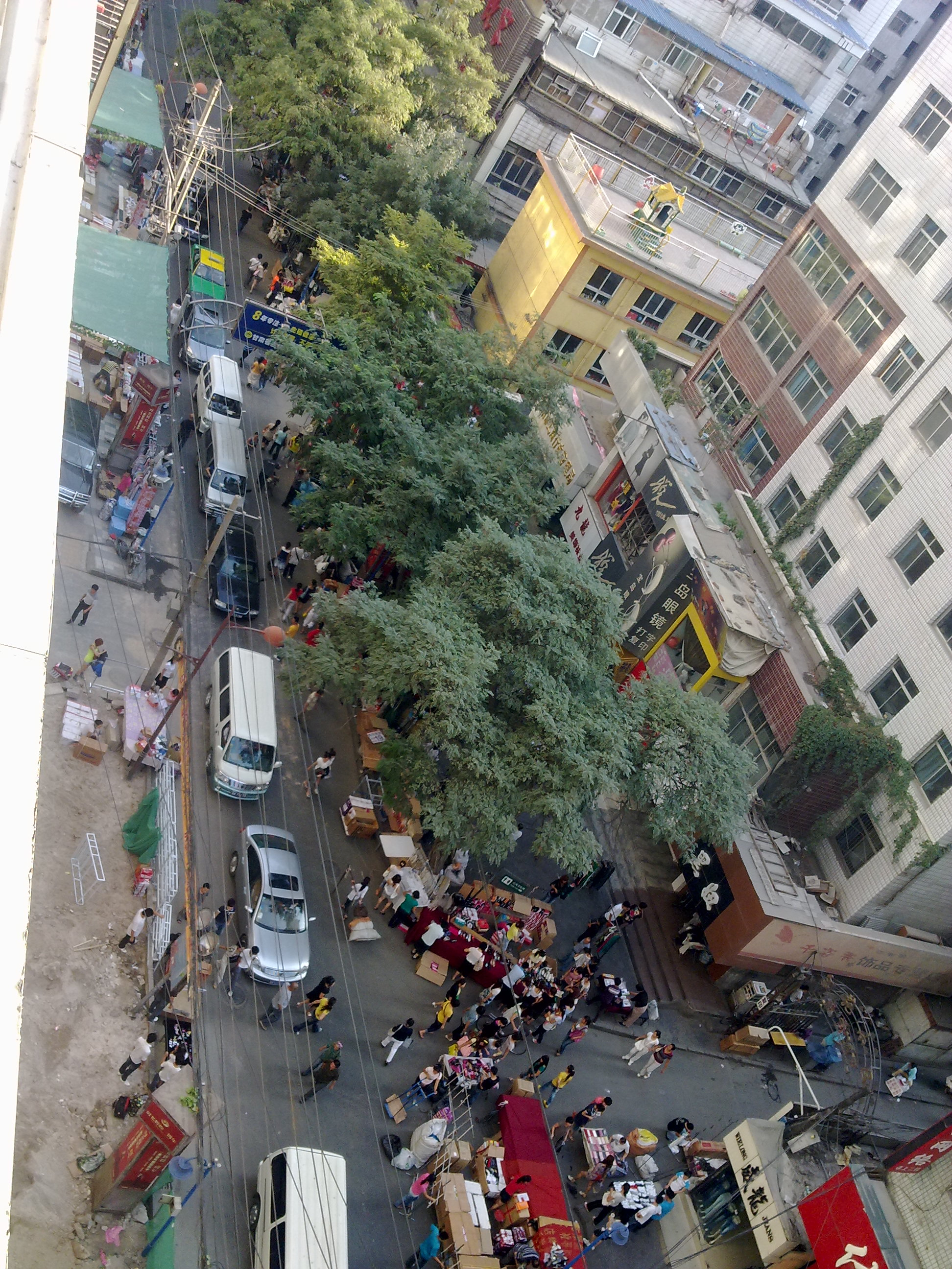 俯视永昌路12